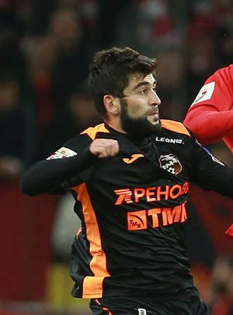 Эдгар Манучарян в составе ФК "Урал"